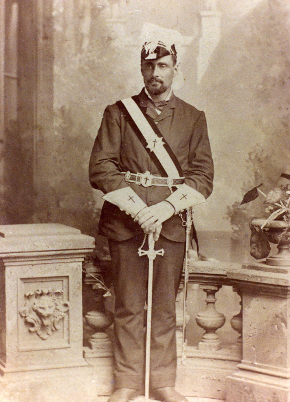 Lafayette Campbell (1849-1937)